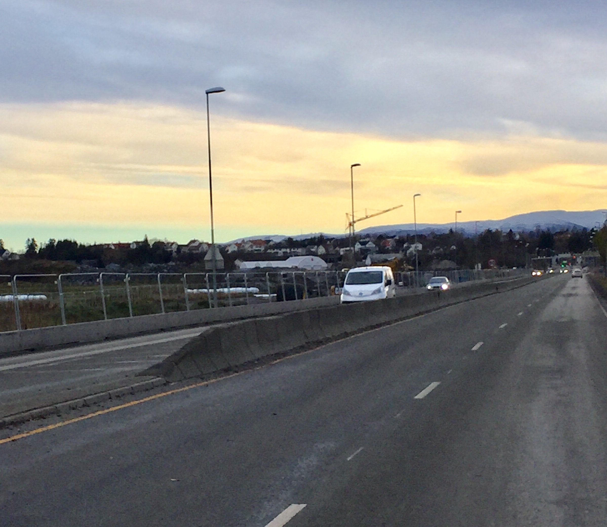 midtdeler